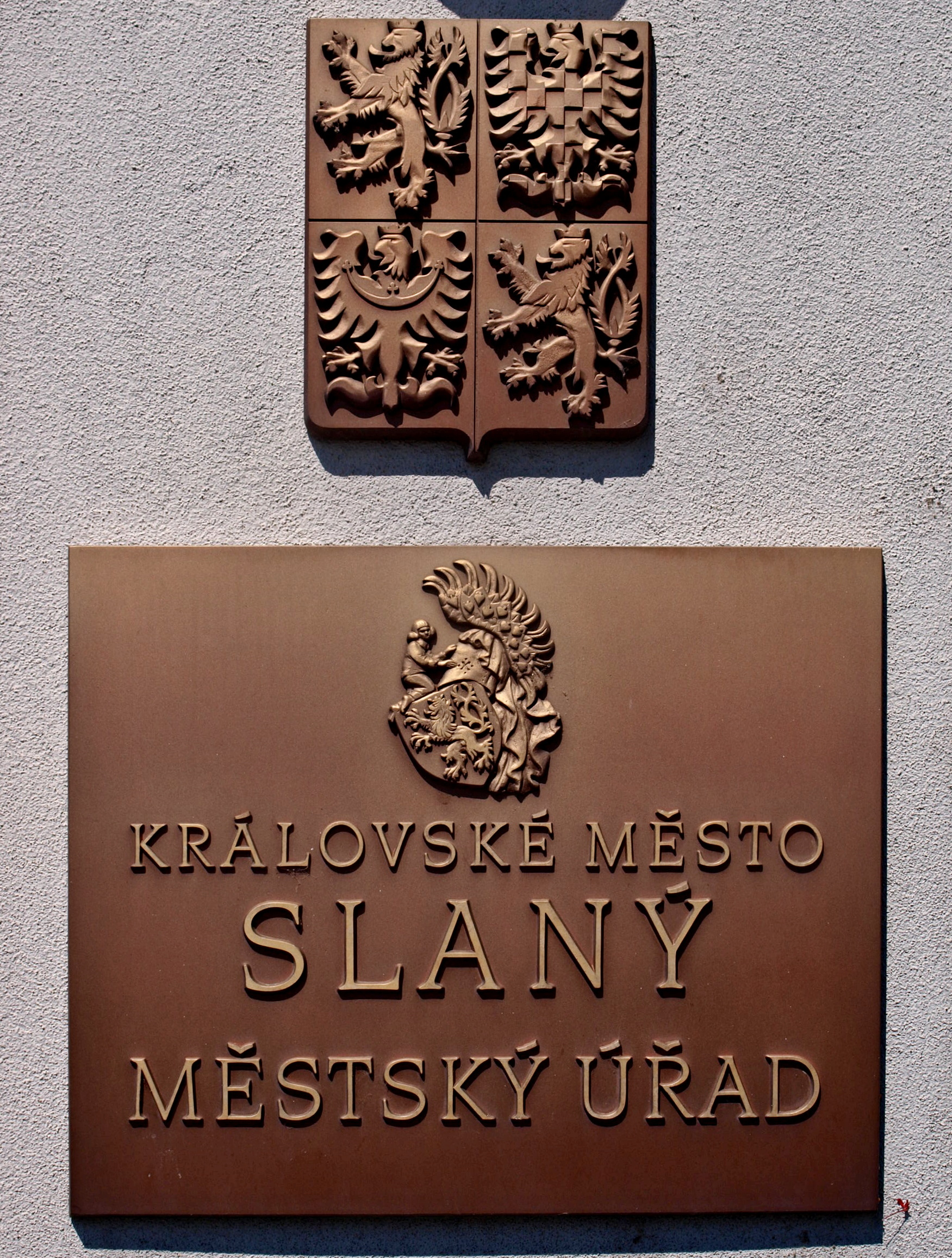 Královské město Slaný